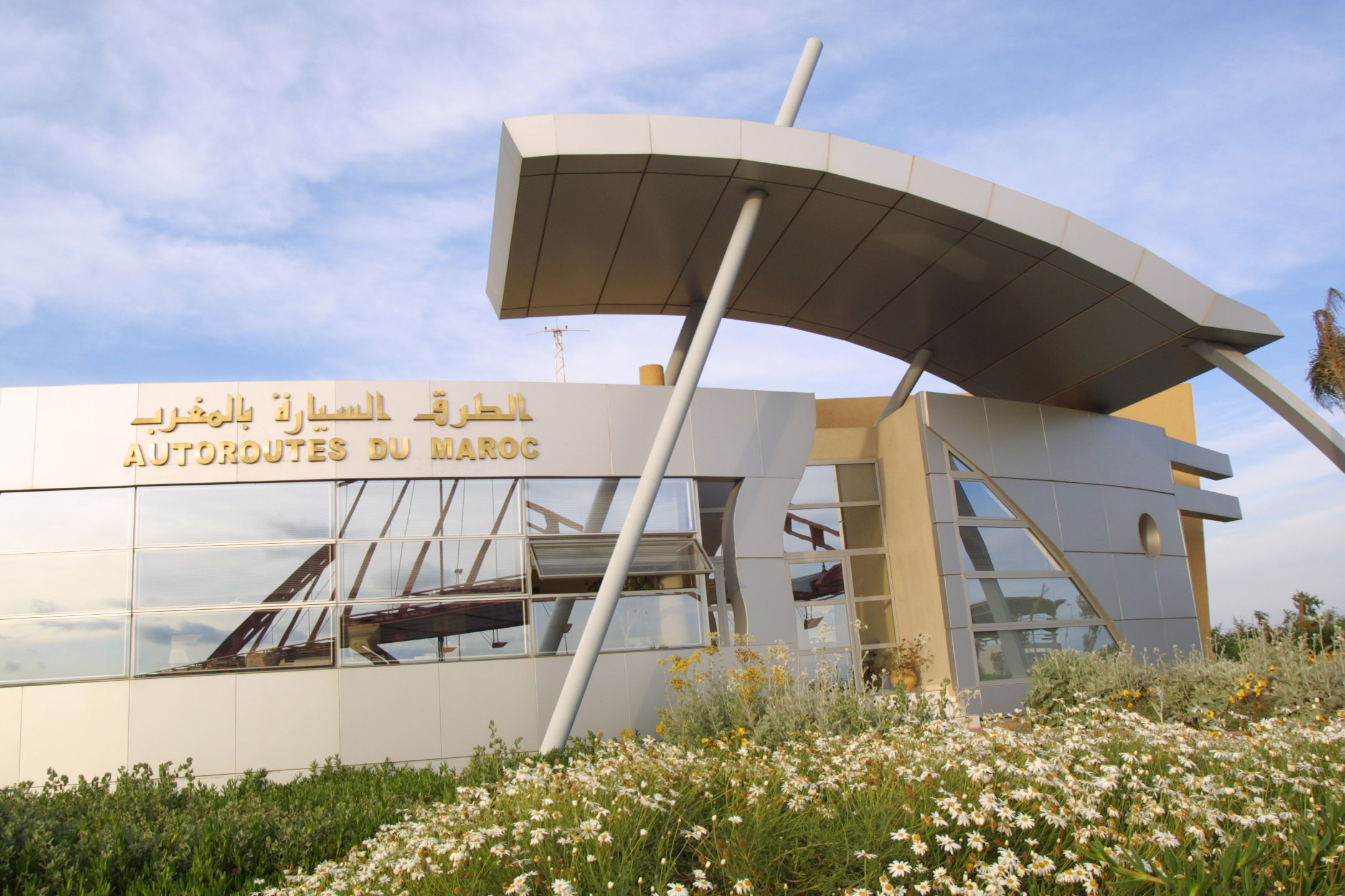 Home of the Conseil d’Administration de la Société Nationale des Autoroutes du Maroc